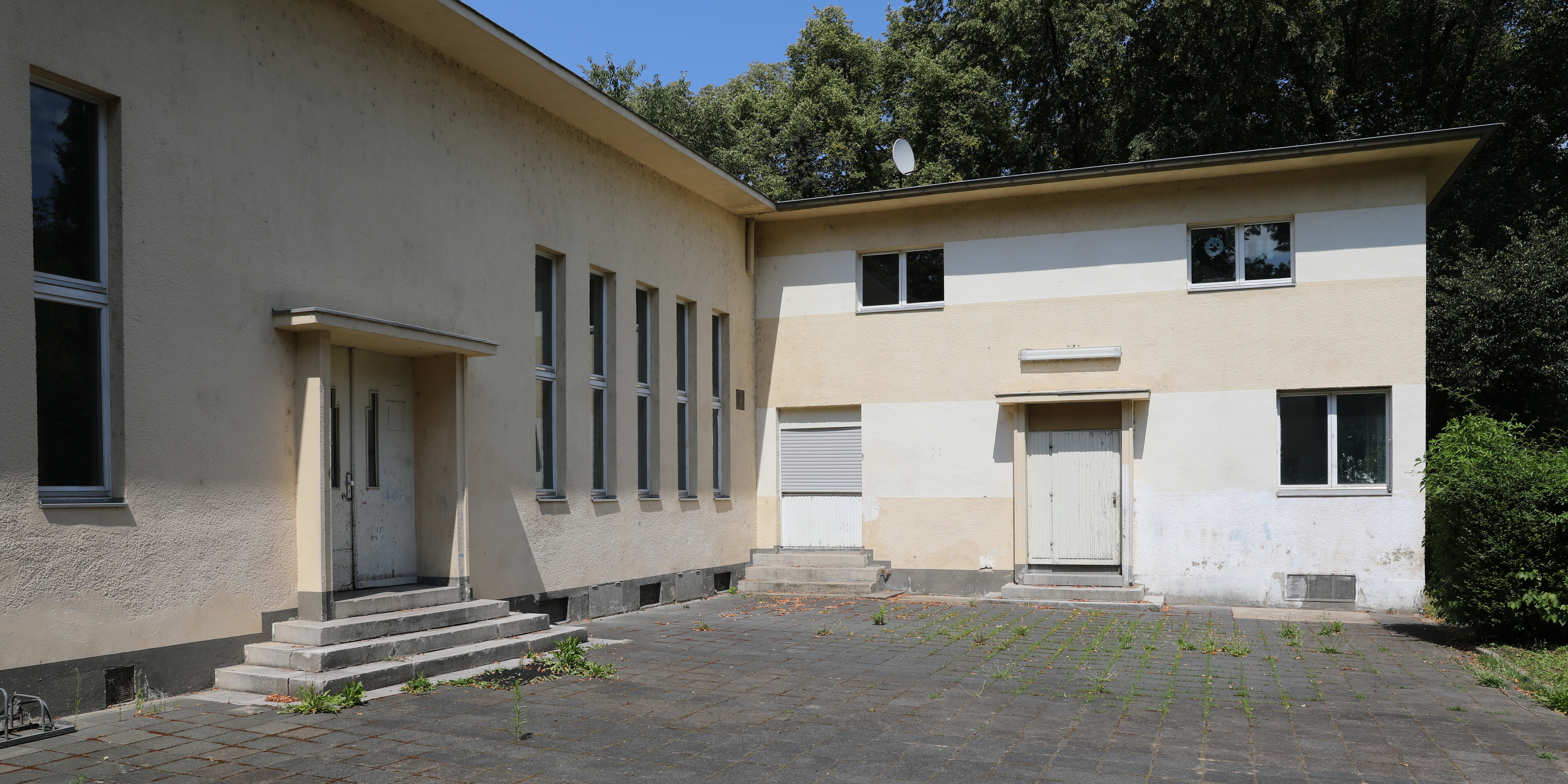 Ehemaliges Funkhaus der WERAG (Vorläufergesellschaft des WDR), Köln-Raderthal Hitzelerstraße 125, Englische Siedlung This is a photograph of an architectural monument.